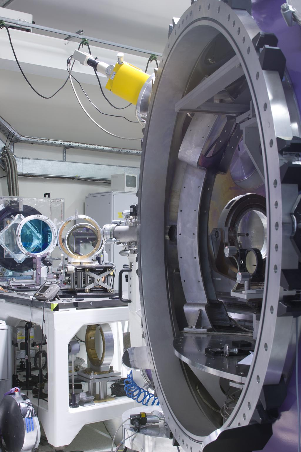 Photo du laboratoire pour l'utilisation des lasers intenses de l'École polytechnique